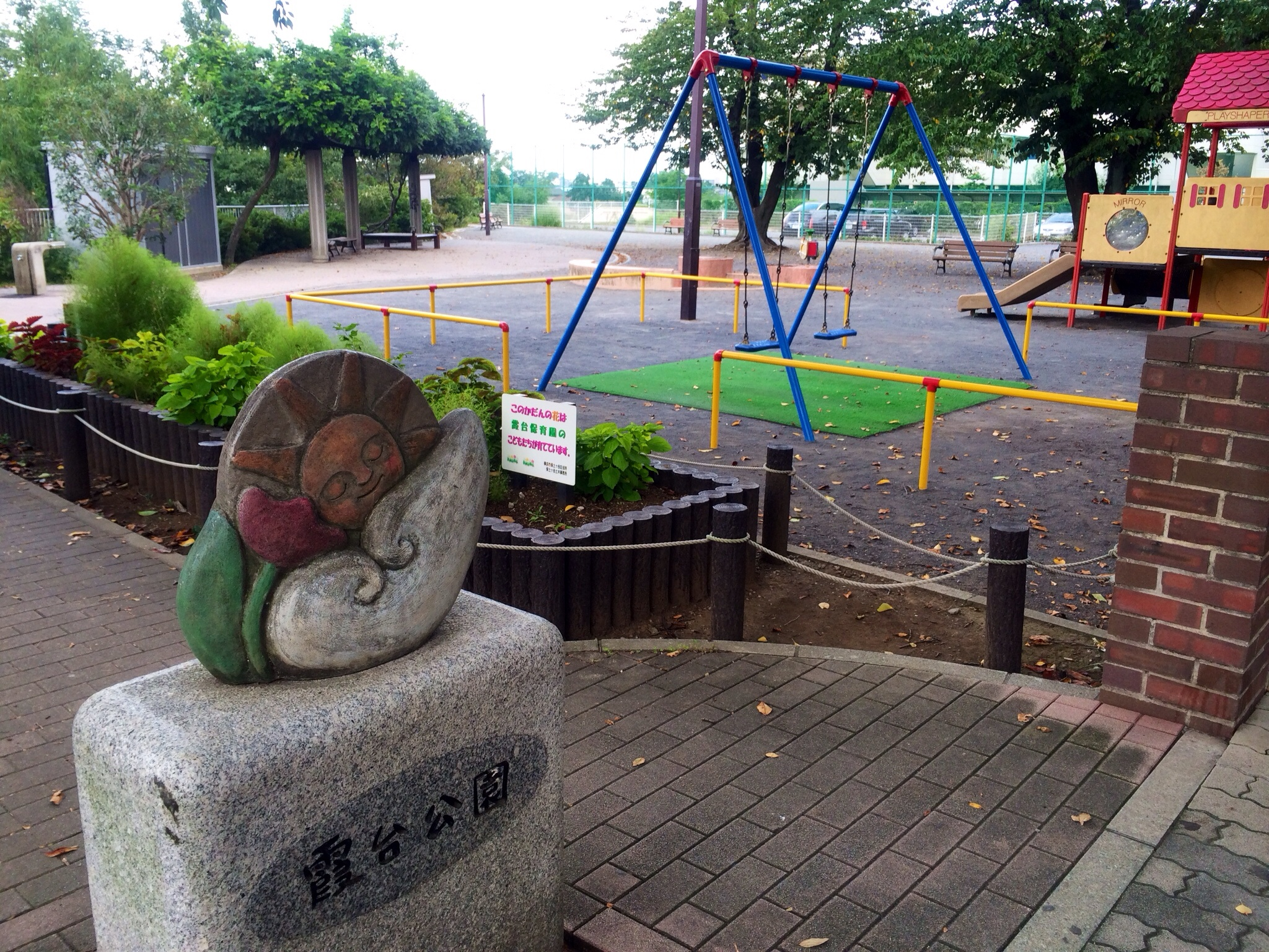 霞台公園の写真